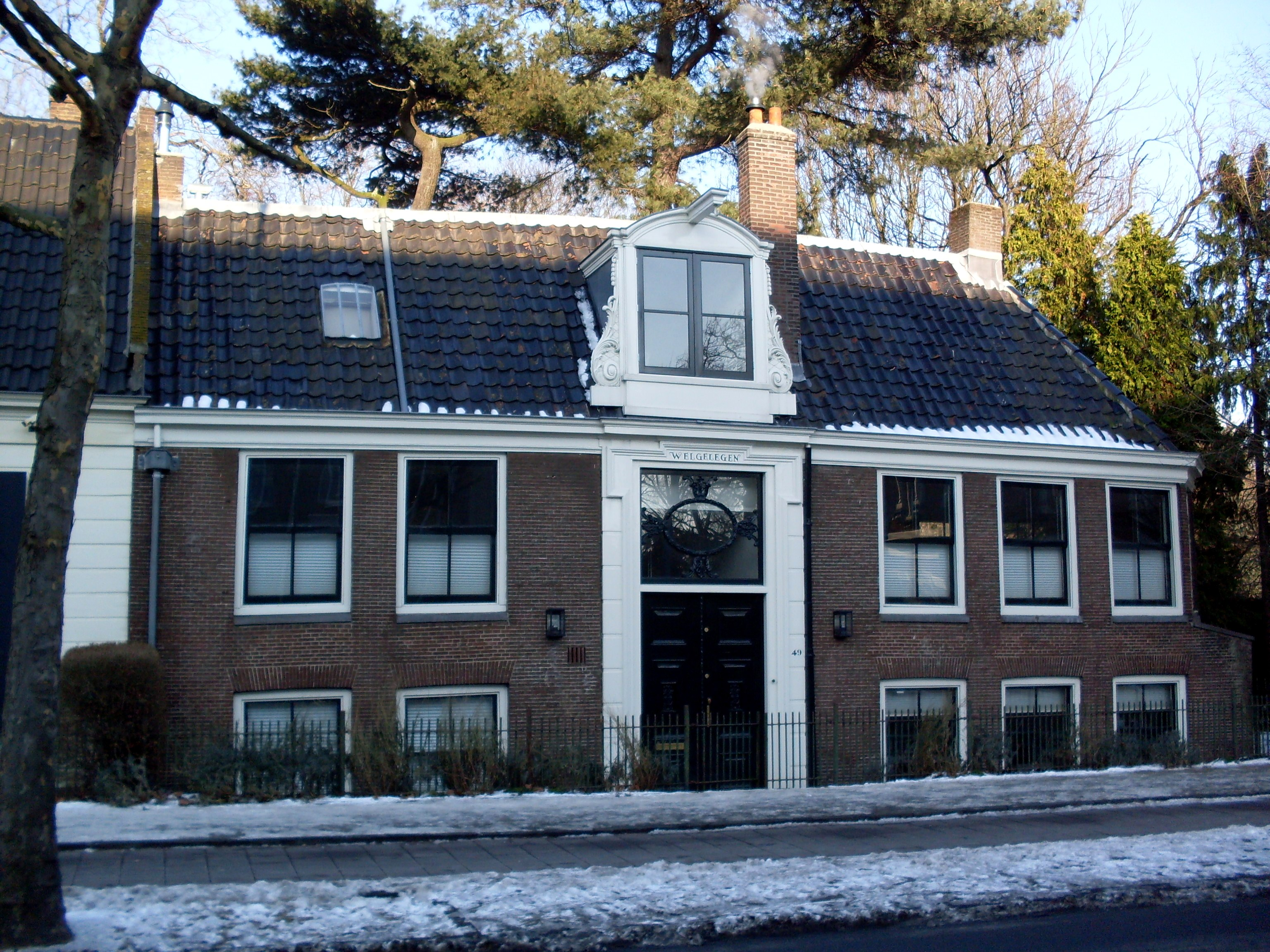 Welgelegen, Plantage Middenlaan 49, Amsterdam